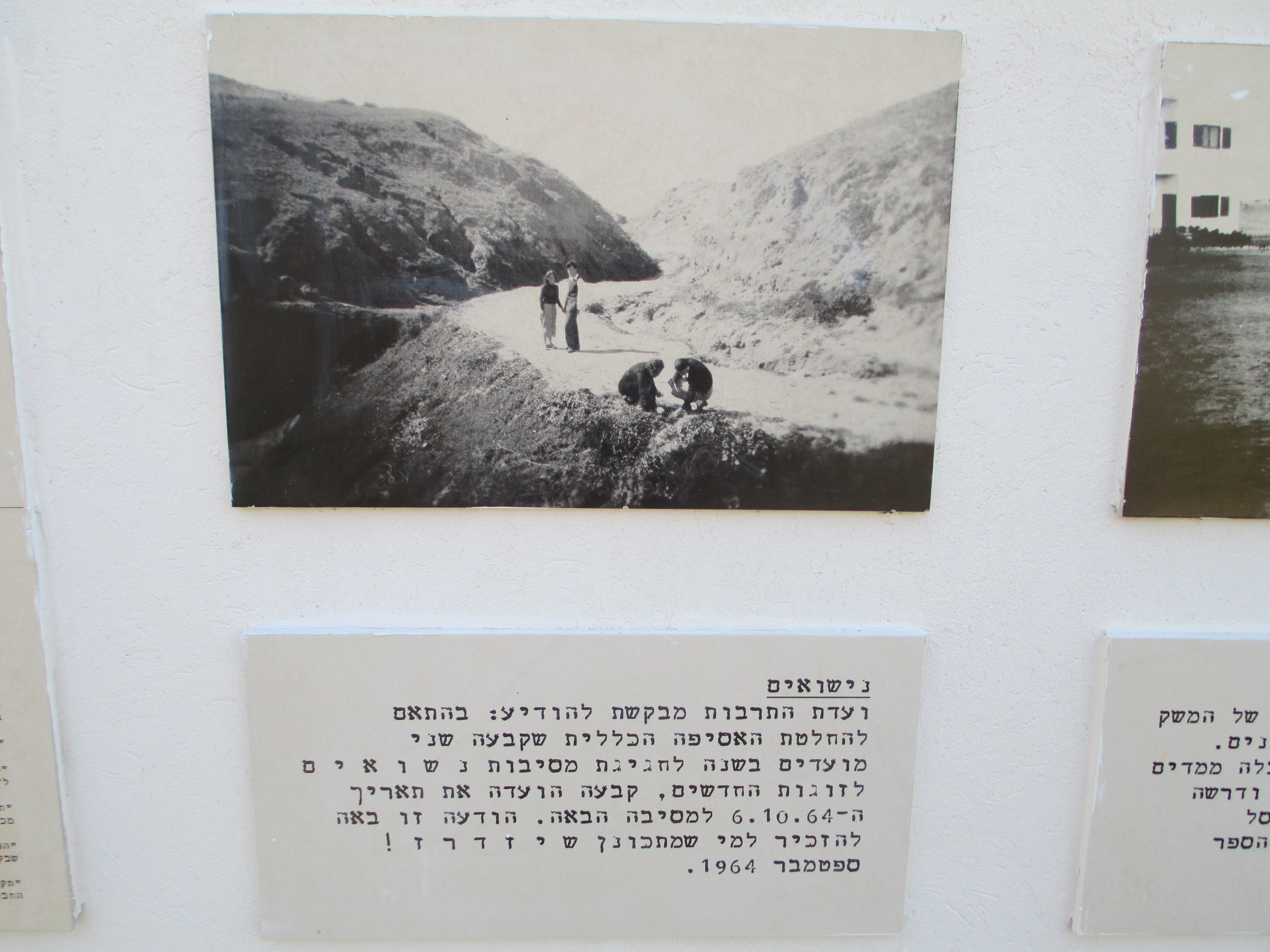 הודעה על סדרי הנישואים בקיבוץ שפיים